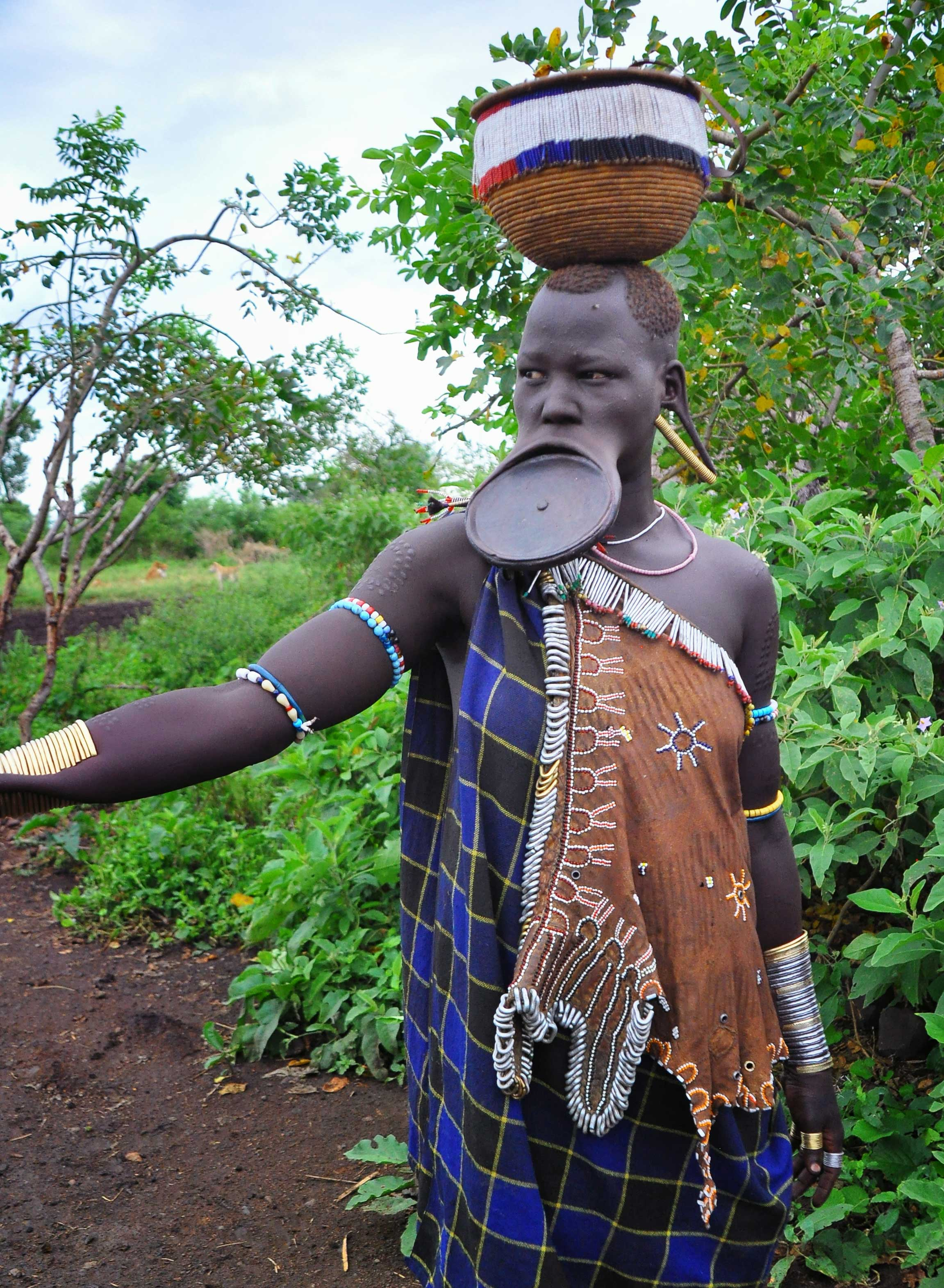 Ethiopia